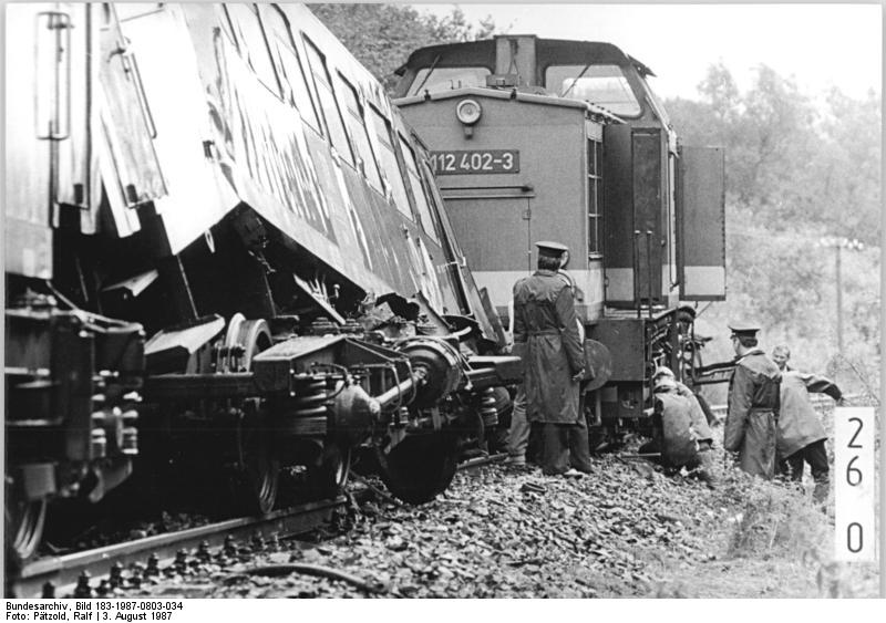 ADN-ZB Pätzold-3.8.1987-Bez. Schwerin: Unfall- Ein schwerer Unfall ereignete sich auf der Eisenbahnstrecke Schwerin-Rehna. Mit einem Personenzug, der wegen eines Triebfahrzeugschadens auf offener Strecke stehengeblieben war, stieß in der Nähe der Ortschaft Holdorf, Kreis Gadebusch, eine Ersatzlokomotive zusammen. Durch den Aufprall wurden 17 Personen verletzt, fünf von ihnen, darunter beide Lokführer, schwer. An beiden Lokomotiven und drei Wagen des Personenzuges entstand erheblicher Sachschaden.